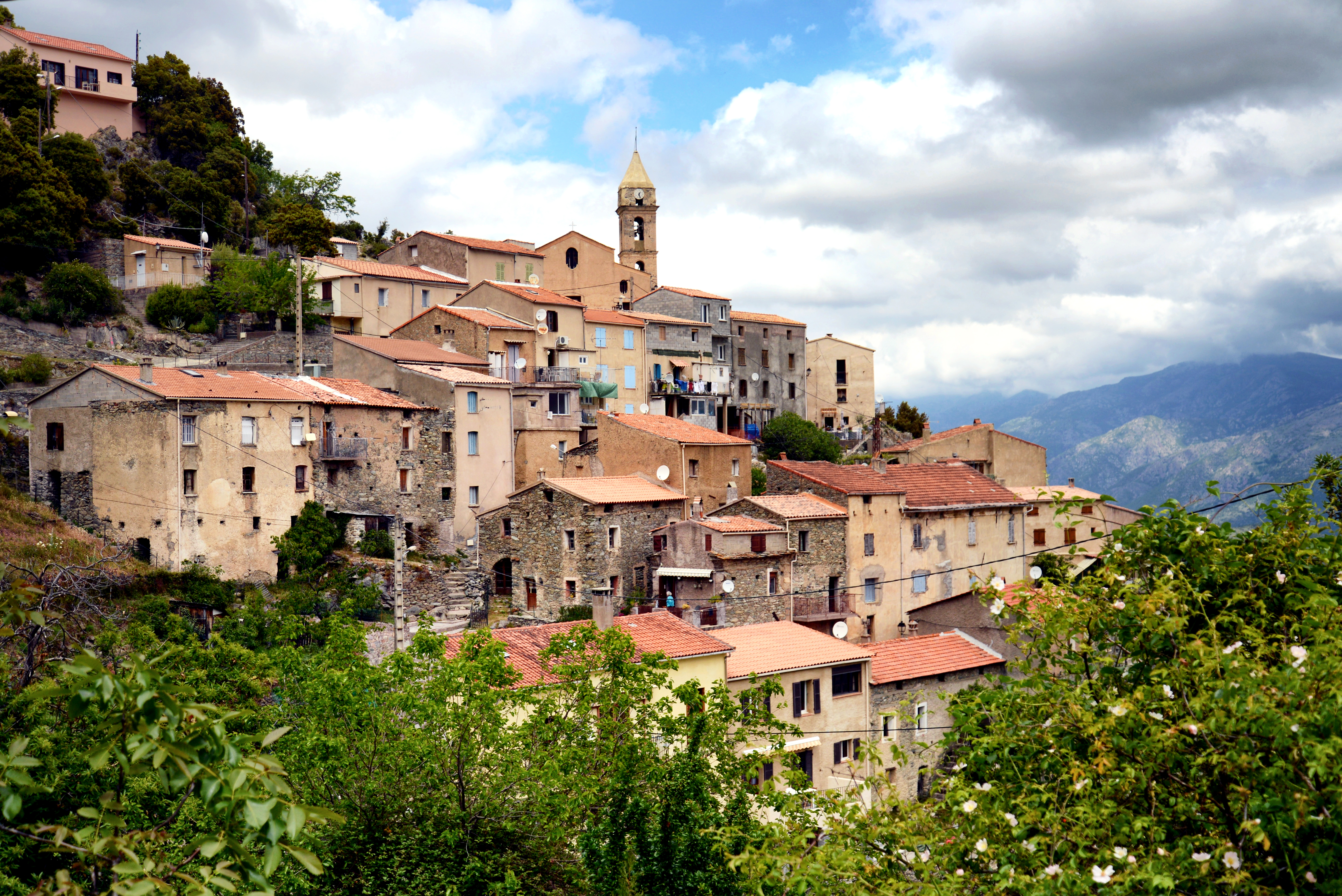 Prato-di-Giovellina (Corse) - Vue du village